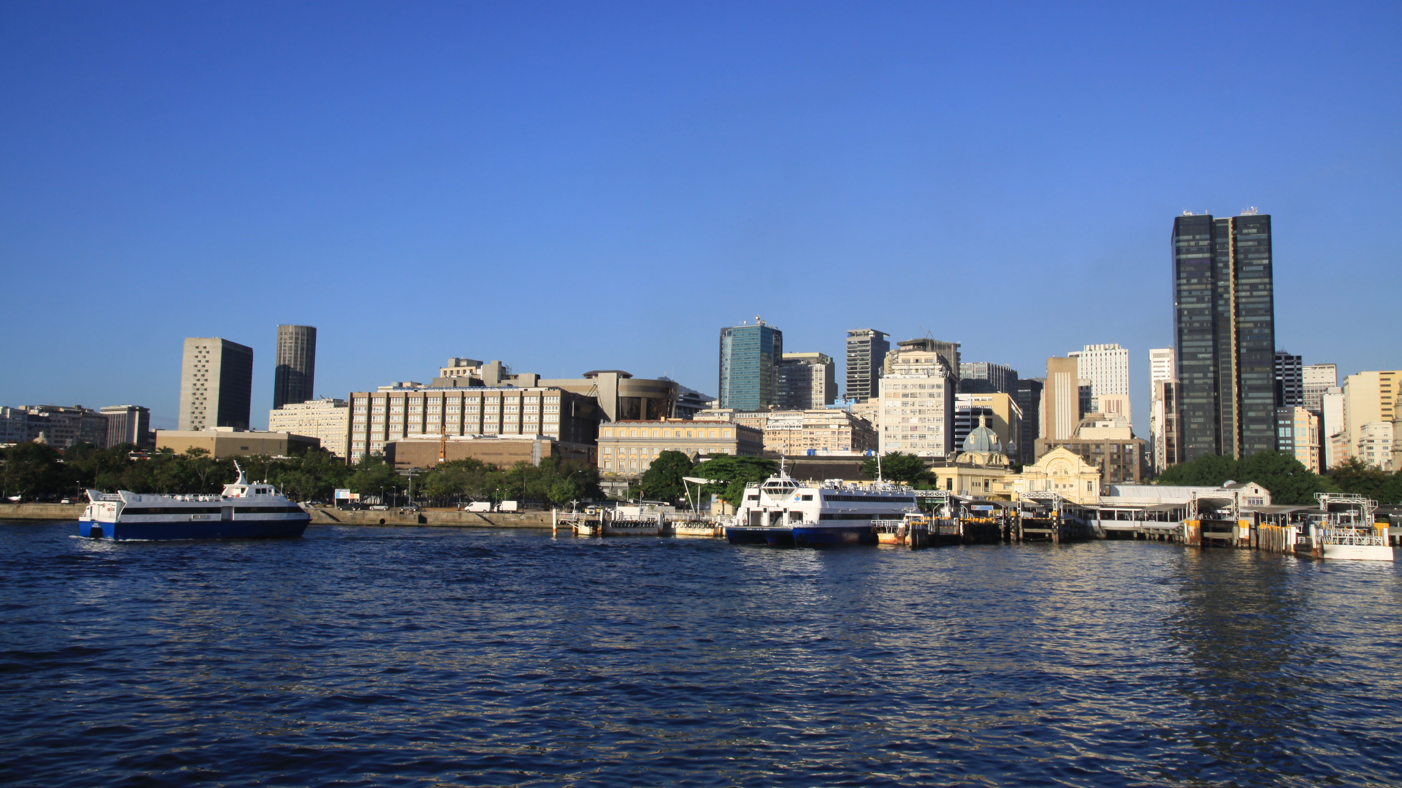 Cais da Praça Quinze de Novembro visto da lancha para Paquetá.